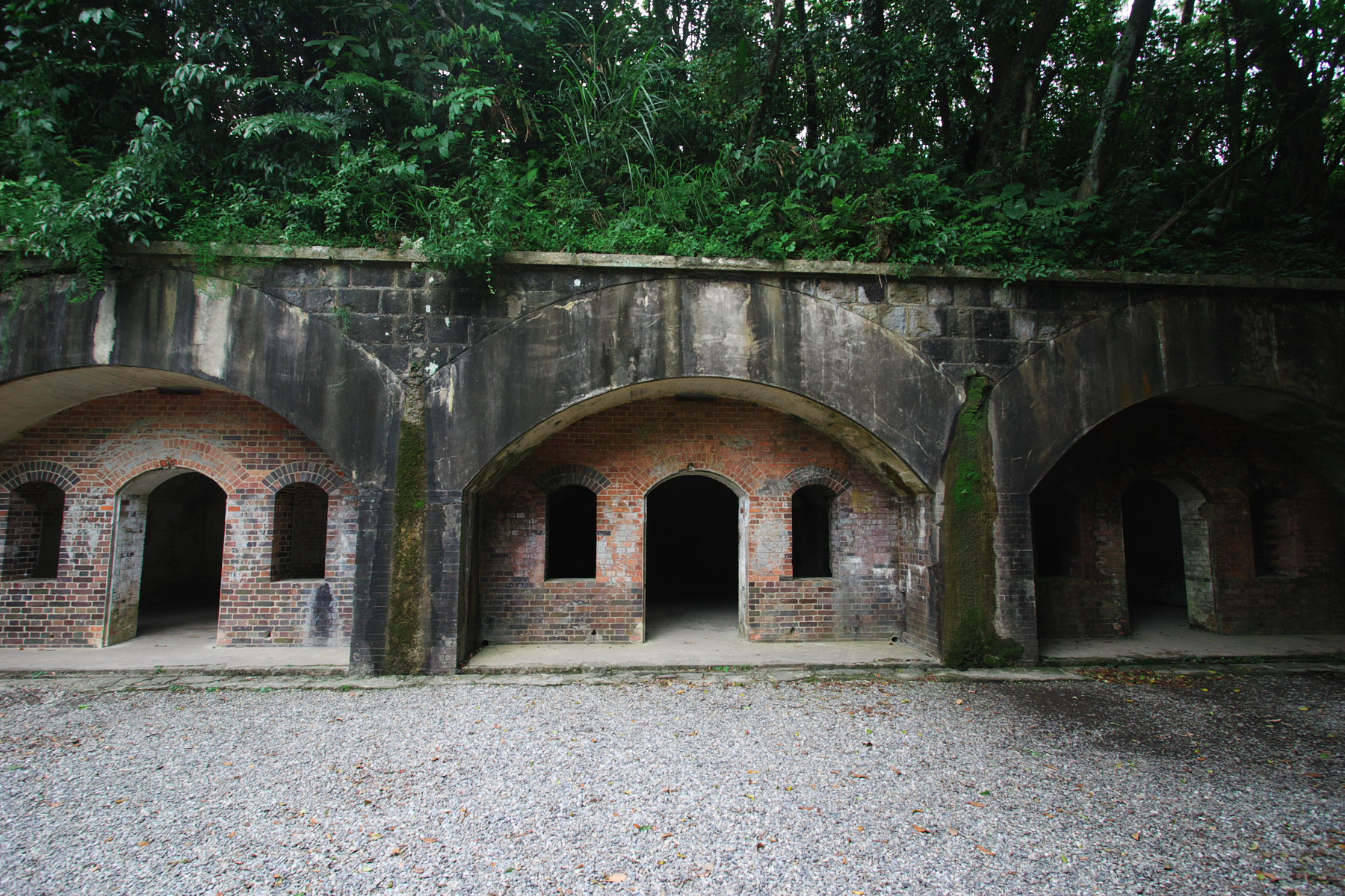 IMG 1867 Dawulun Fort